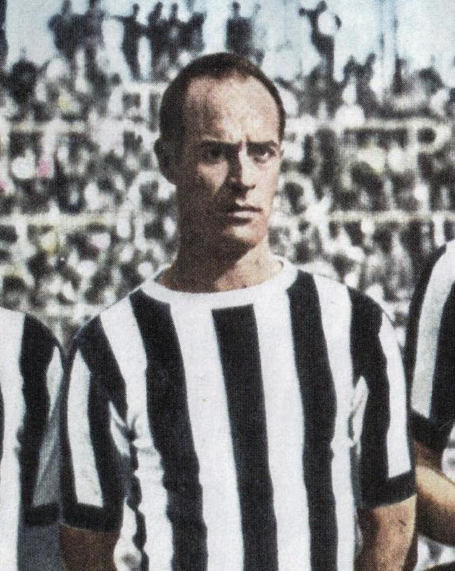 Il calciatore italiano Alberto Piccinini alla Juventus nella stagione 1951-52.